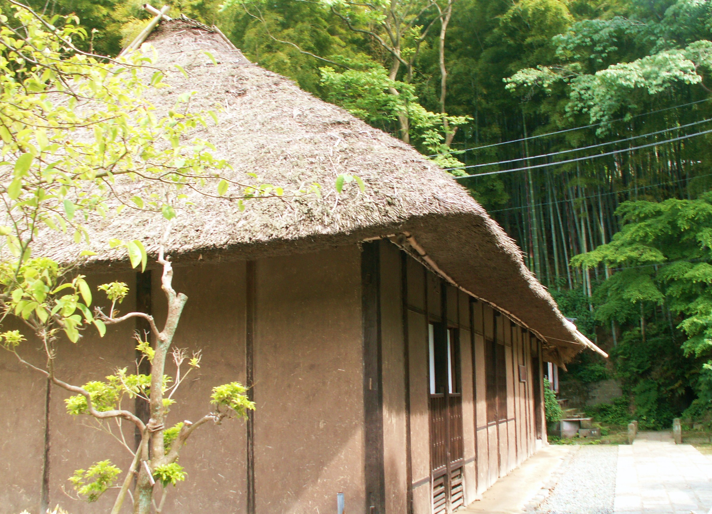 石井家旧宅（龍宝寺敷地内）